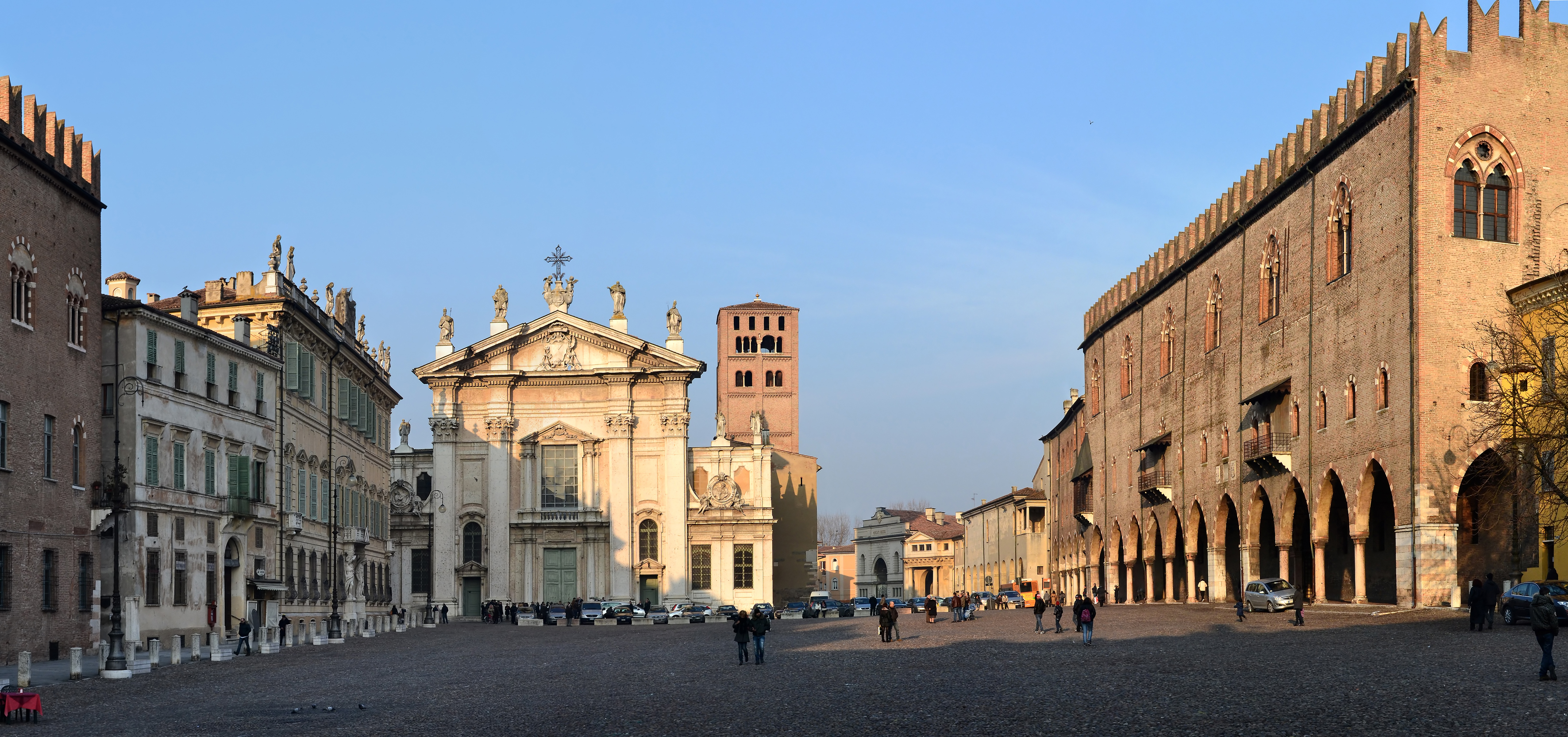 Mantova piazza sordello con il palazzo Ducale This is a photo of a monument which is part of cultural heritage of Italy.